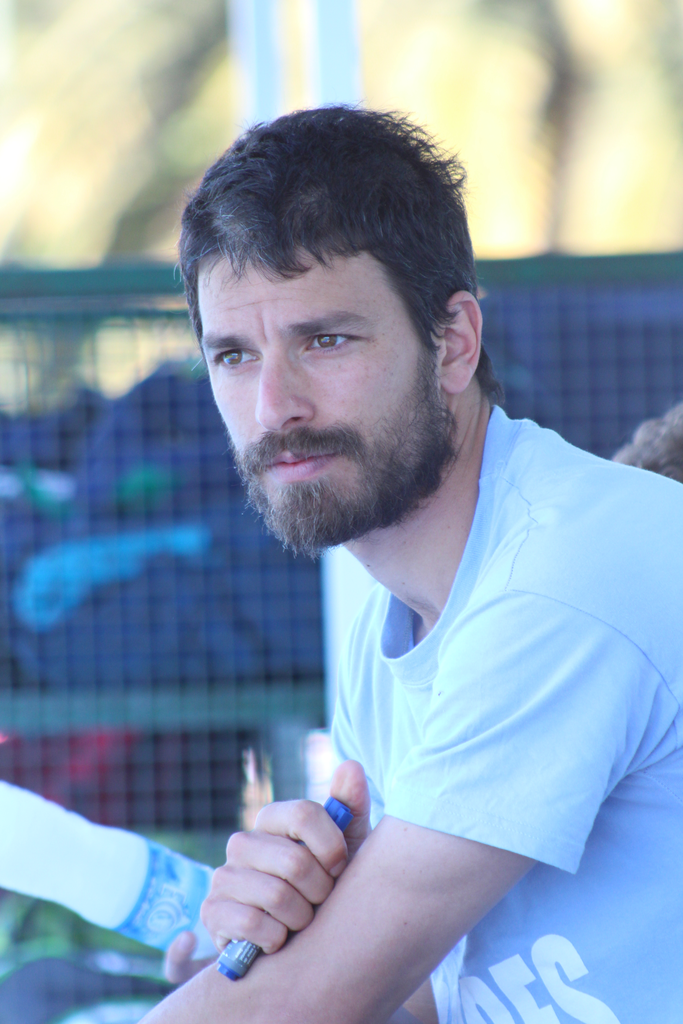 Matias Gonzalez